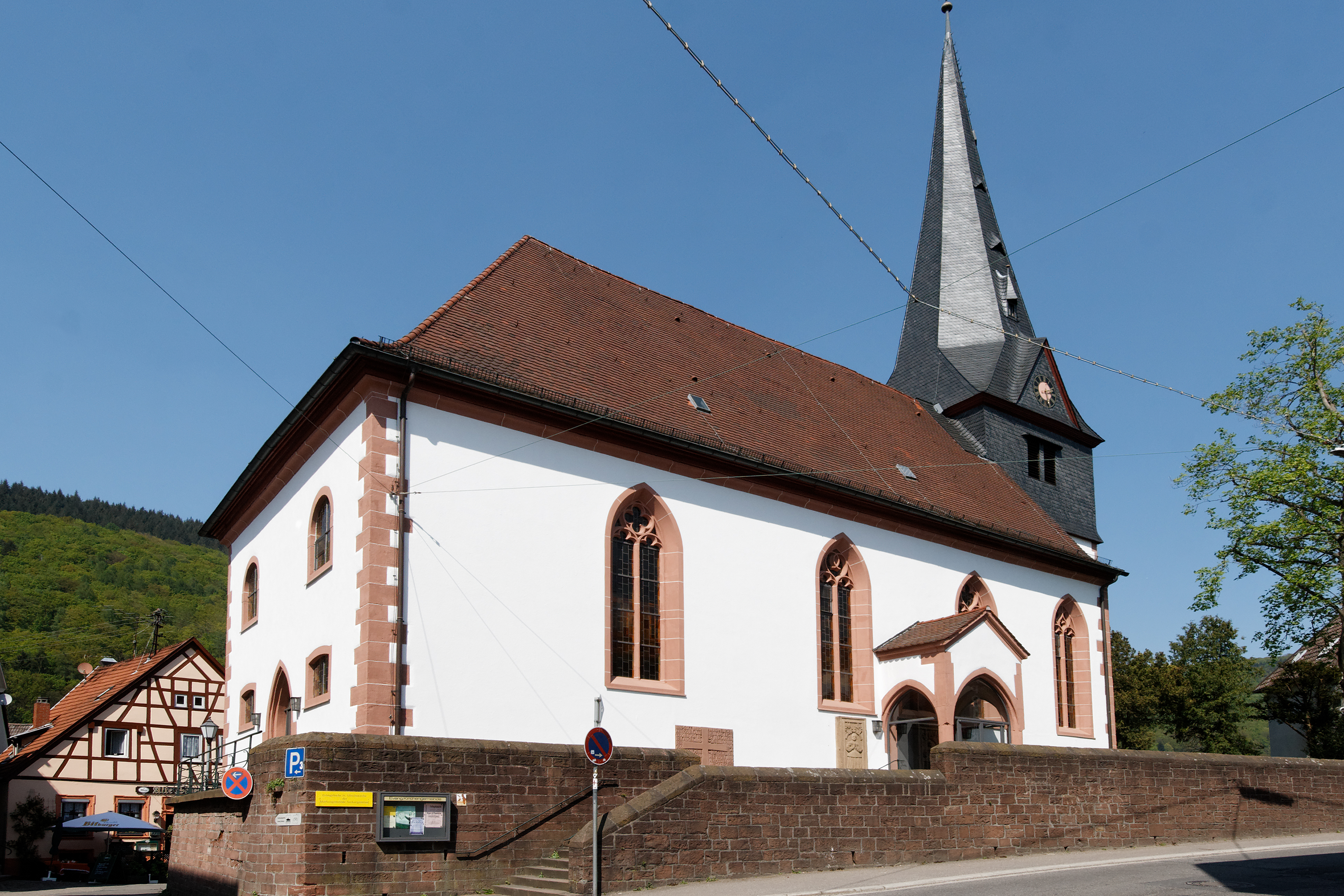 Kirche St. Ulrich der evangelischen Markusgemeinde in Neckargemünd (Baden).